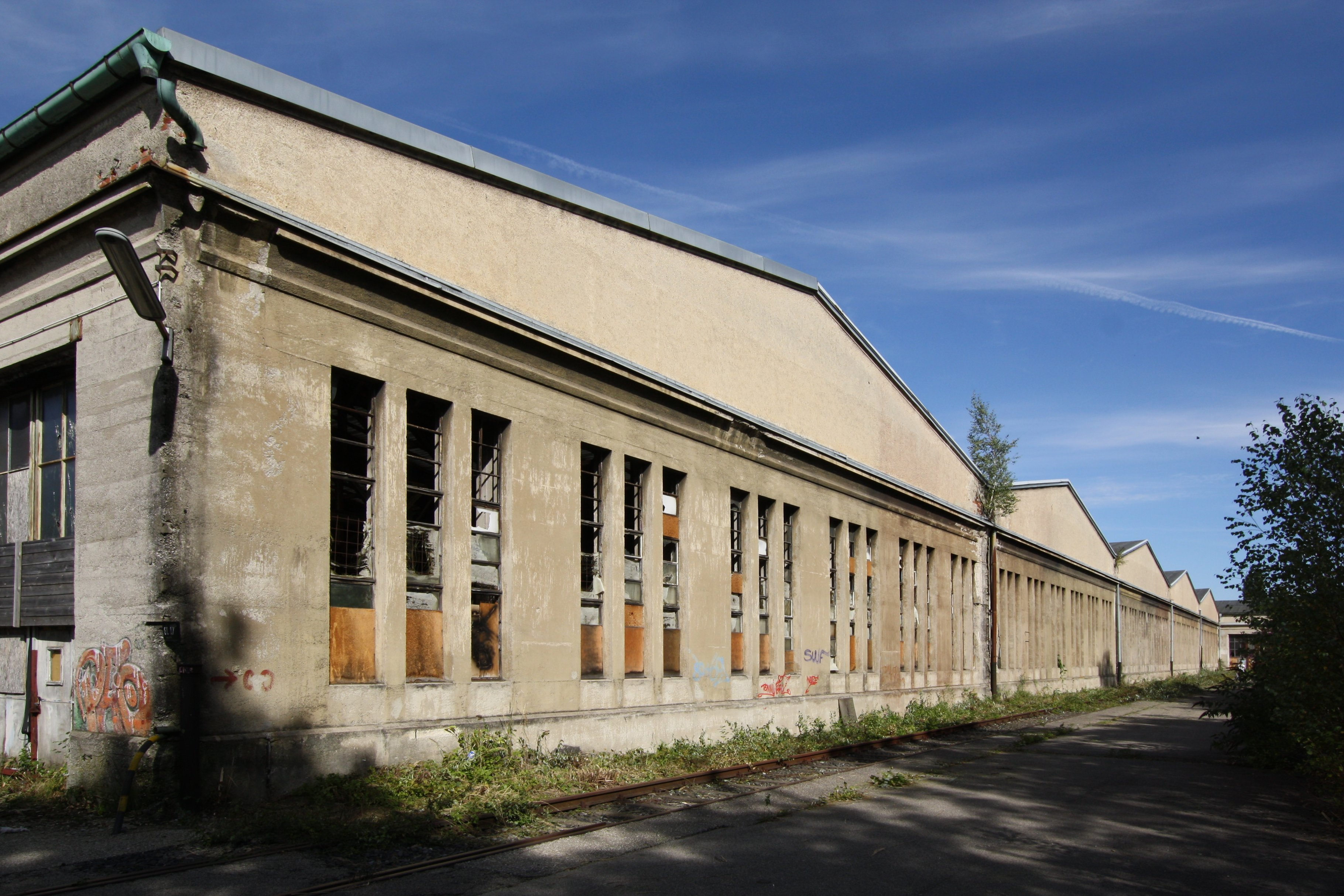 ehemaliges Betriebswerk München 4, Berg am Laim